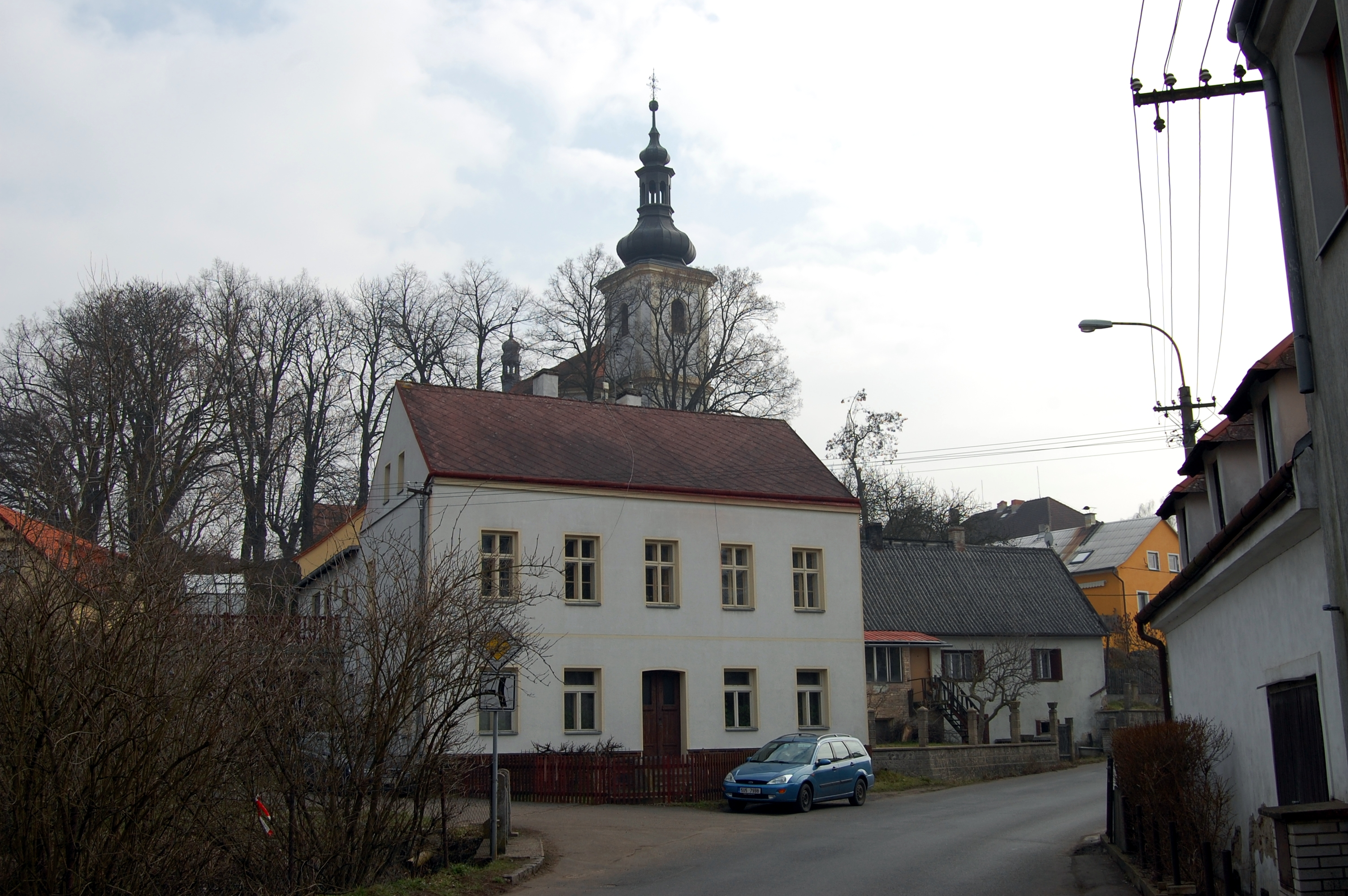 Zástavba ve Skoroticích, v pozadí kostel svatého Václava